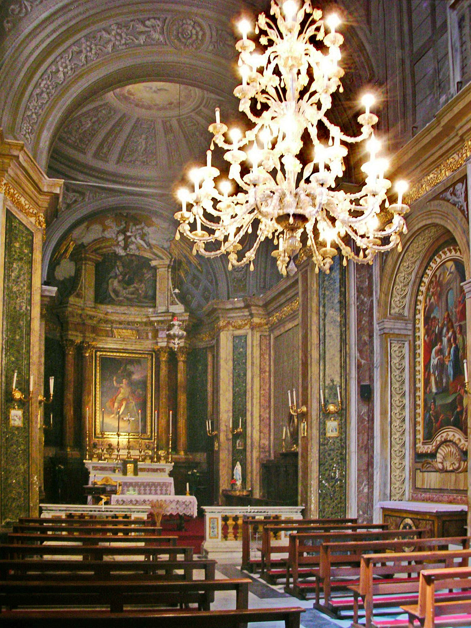 Interior, San Giovanni della Pigna, Rome